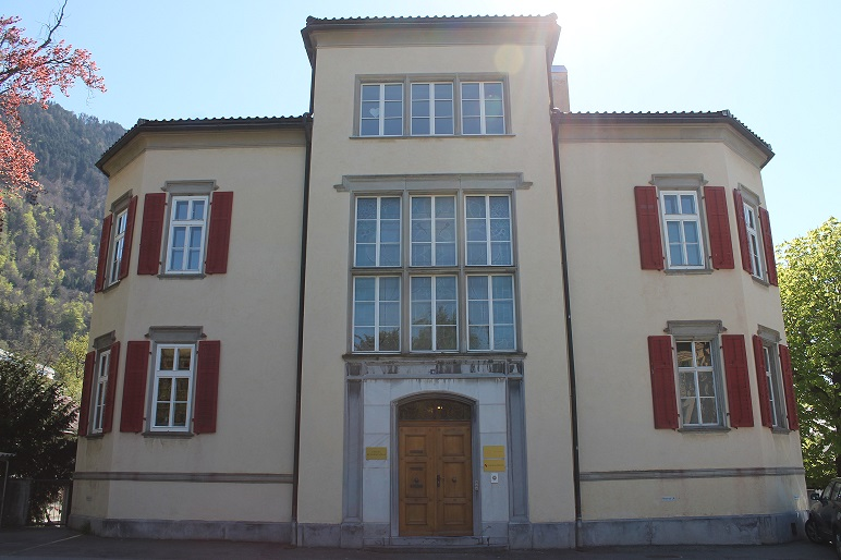 Der Hauptsitz der Lia Rumantscha in Chur. Rumantsch: Sedia principala da la Lia Rumantscha a Cuira.